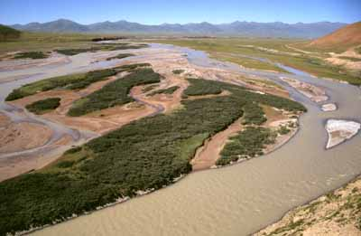 Nebenfluss des Dri Chu, wie der Oberlauf des Jangtse in Tibet heißt. Hier strömt er aus den Weiten des Changthang den tieferen Lagen Khams zu. Foto: Andreas Gruschke (Freiburg)